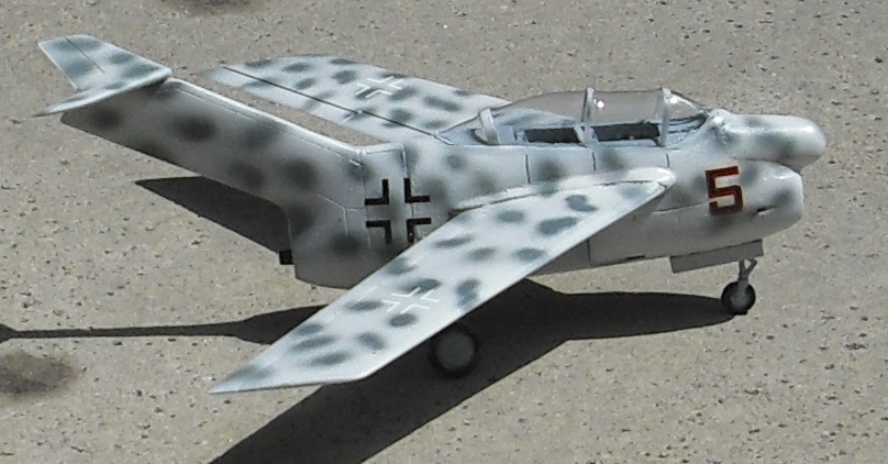 Ta 183 B (Spekulation)